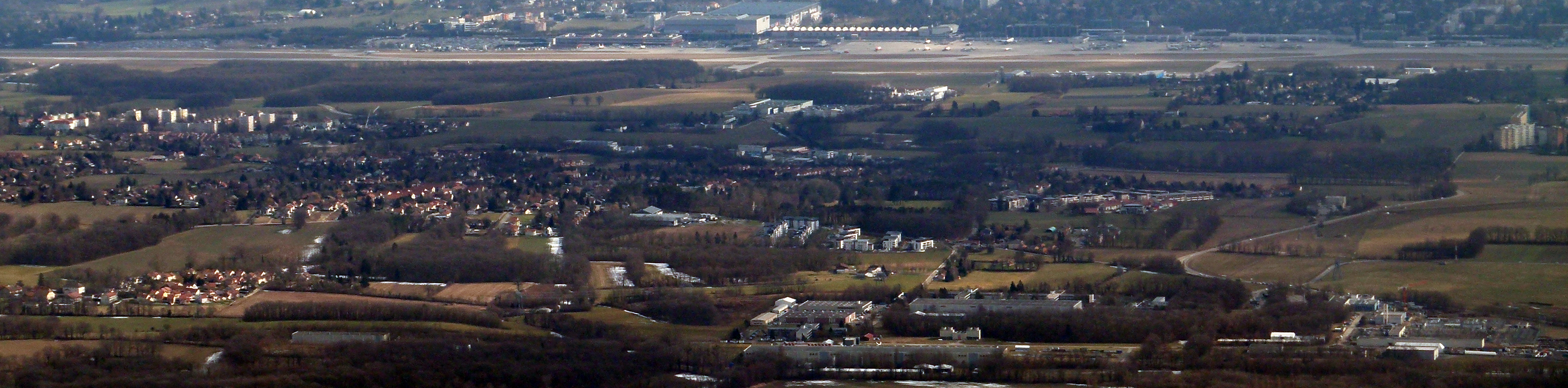 Blick auf Prévessin-Moëns aus der Vogelperspektive, rechts unten: CERN-Prévessin, oben: Flughafen Genf